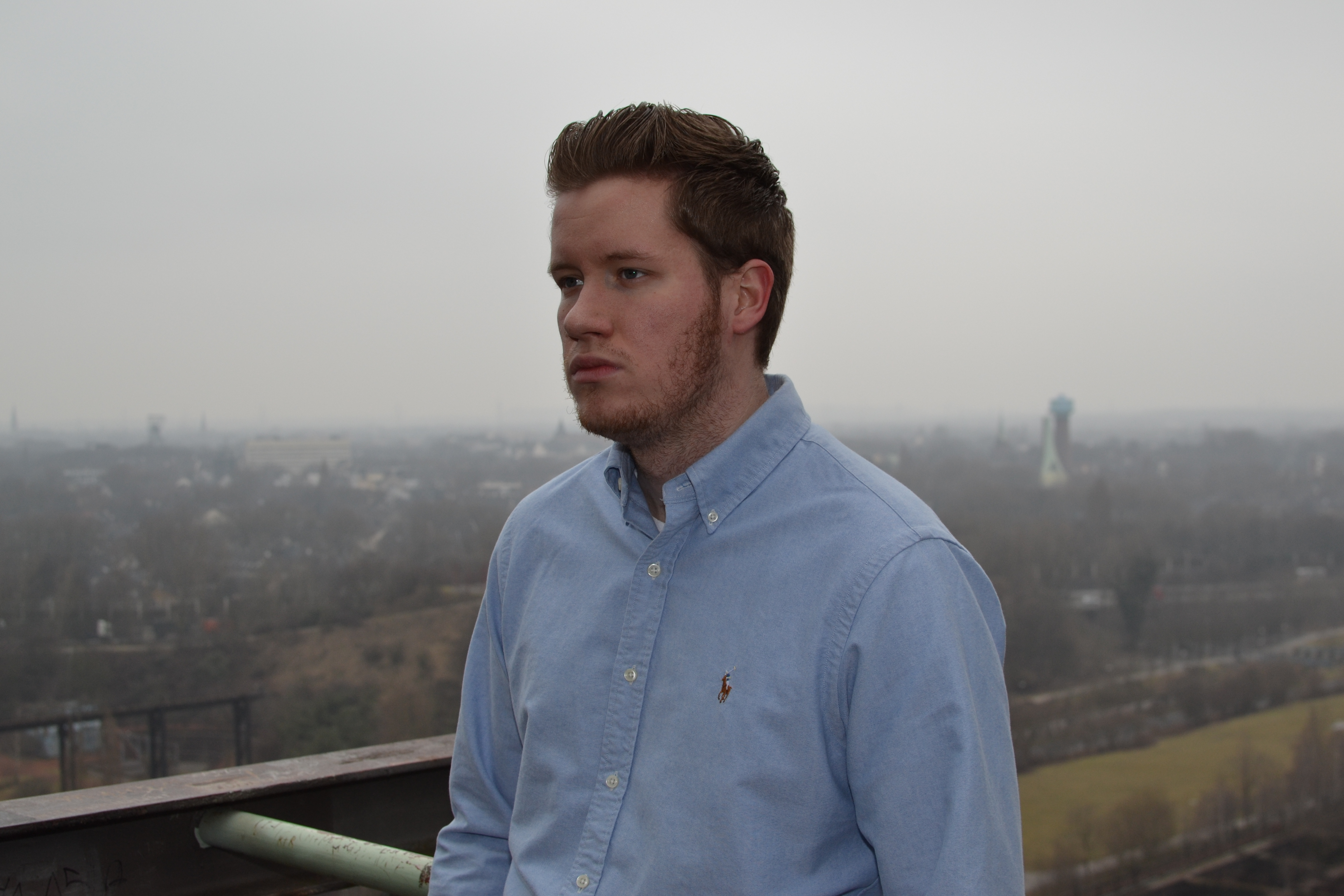 Beim Fotoshoot mit Veganius für die "Erlebnistour"